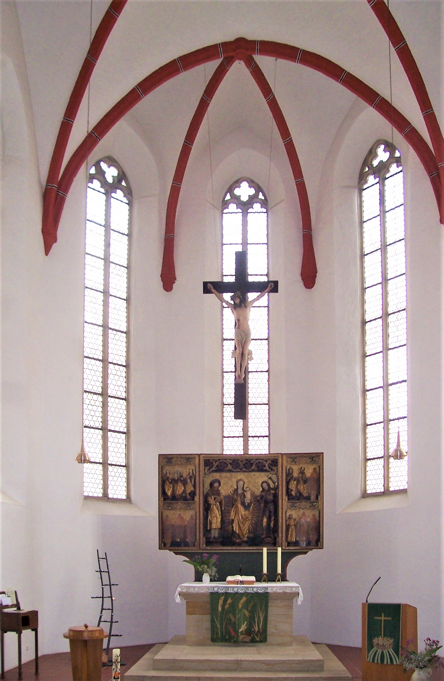 Altar in der Nikolaikirche in Eilenburg